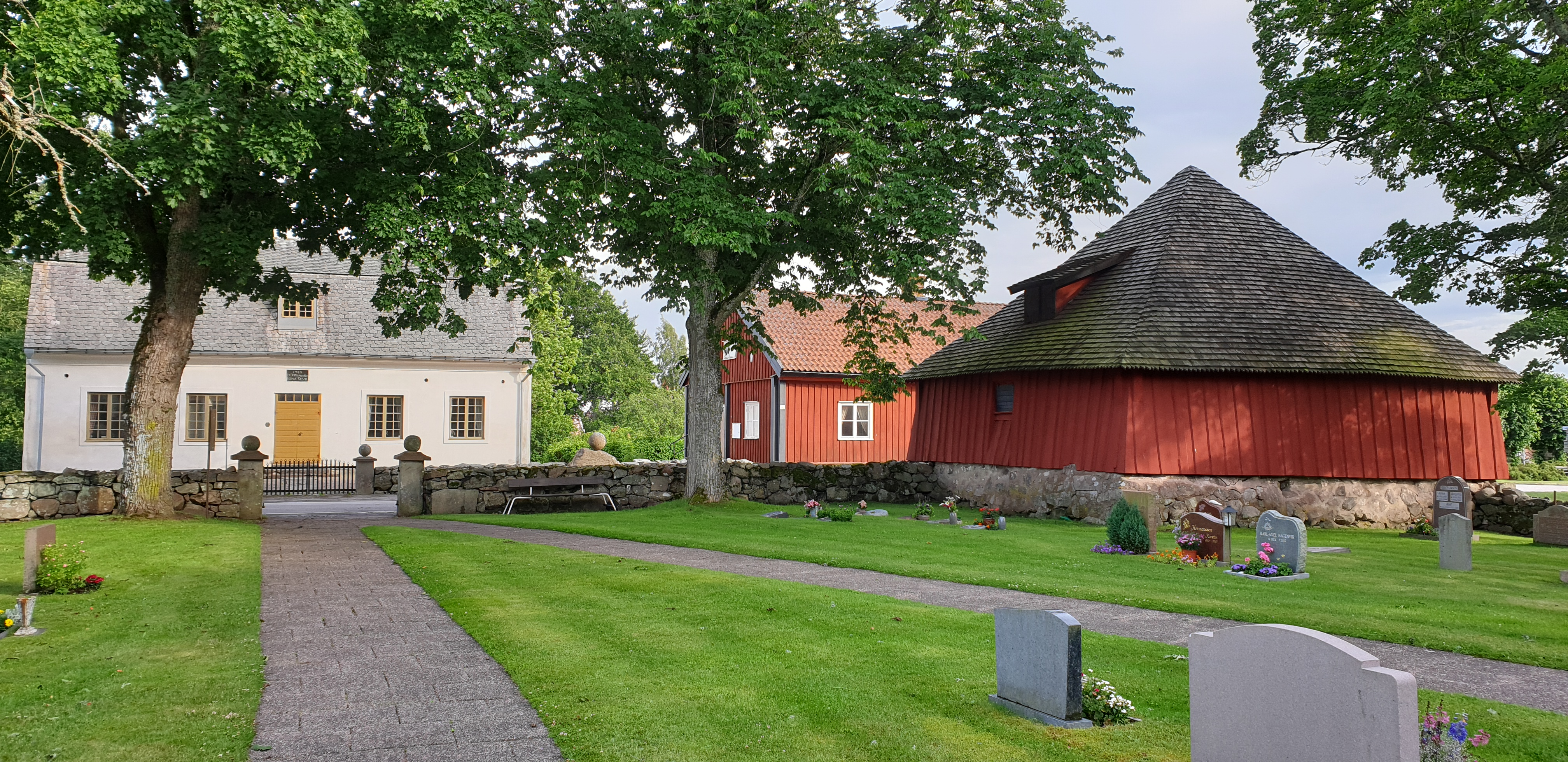 Skolmagasin och skola